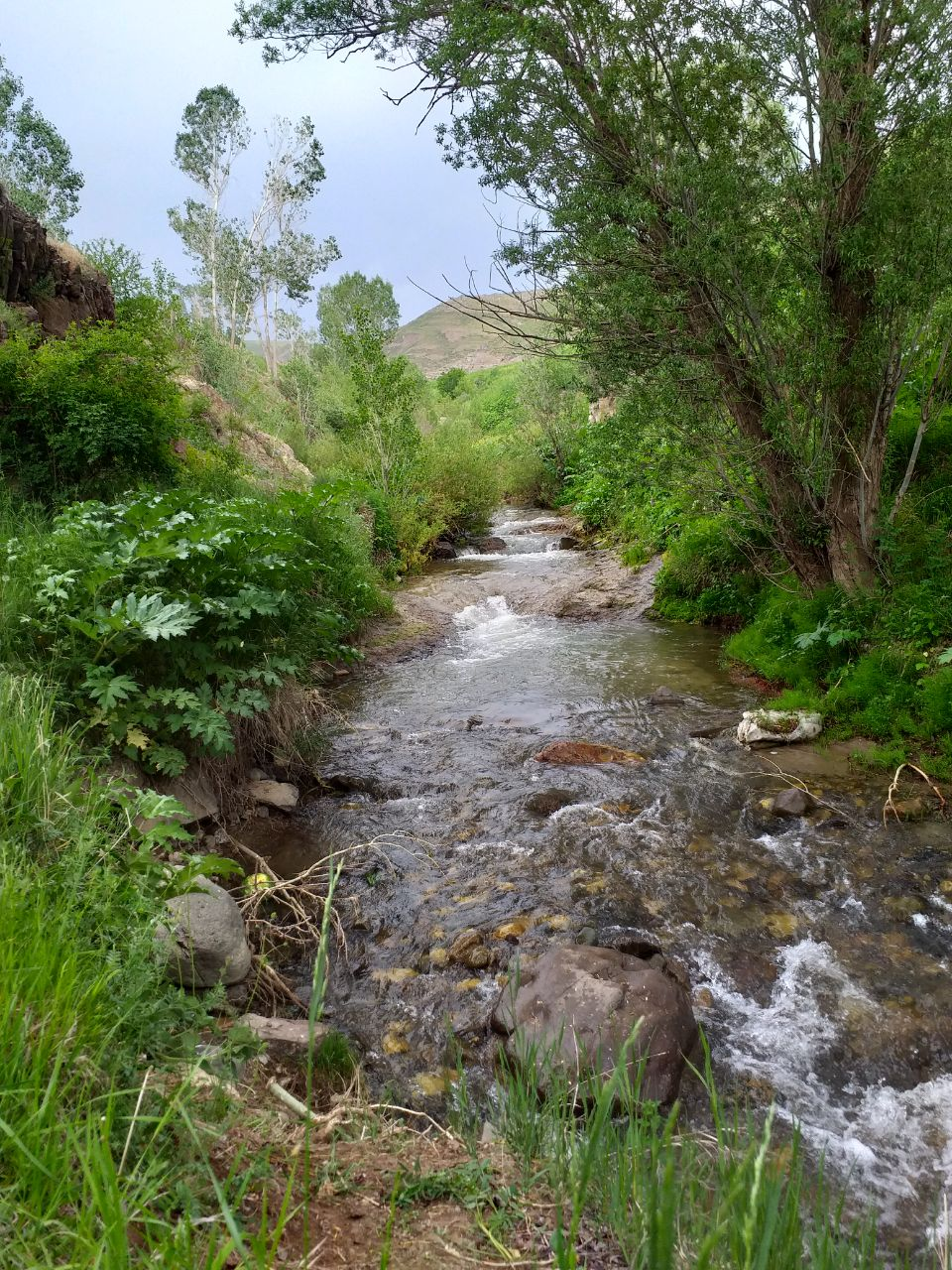 طبیعت سبز مهربان